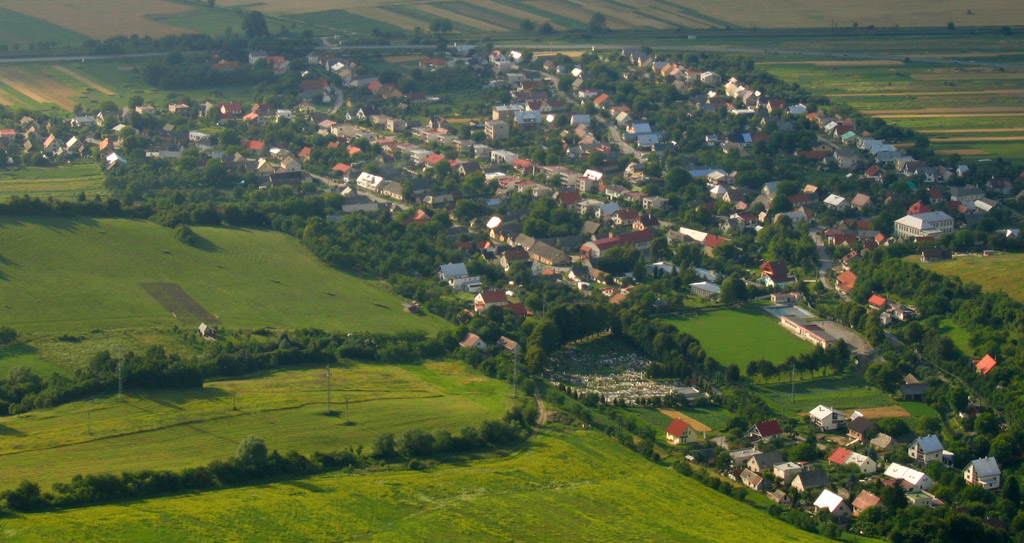 Plevník z Manína